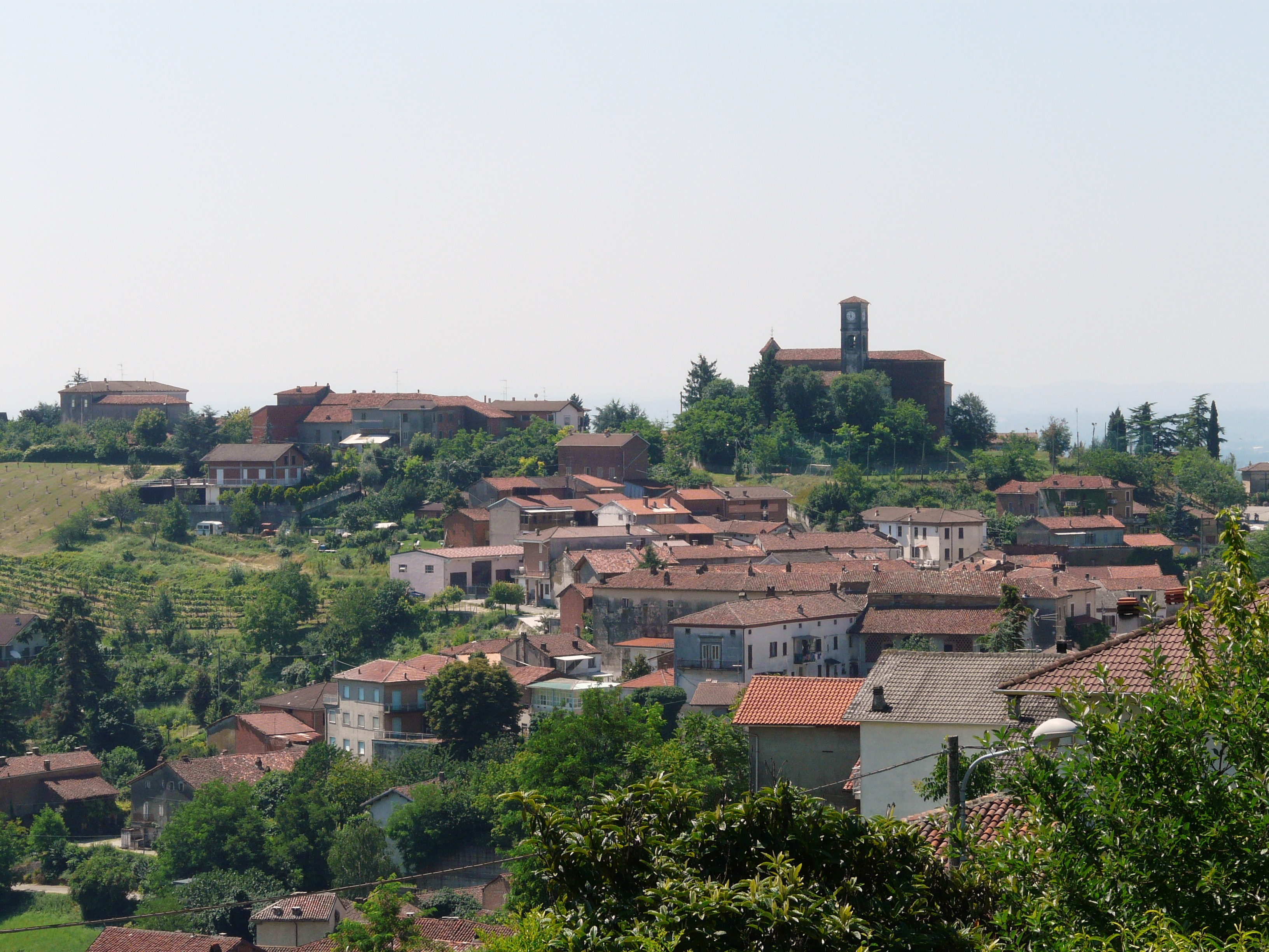 Panorama di Cuccaro Monferrato, Piemonte, Italia